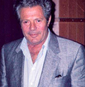 L'attore Marcello Mastroianni durante un doppiaggio presso gli studi dell'International Recording di Roma